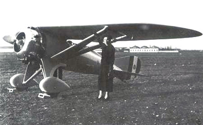 Il P.M.3-4 Vale a Taliedo nel 1937